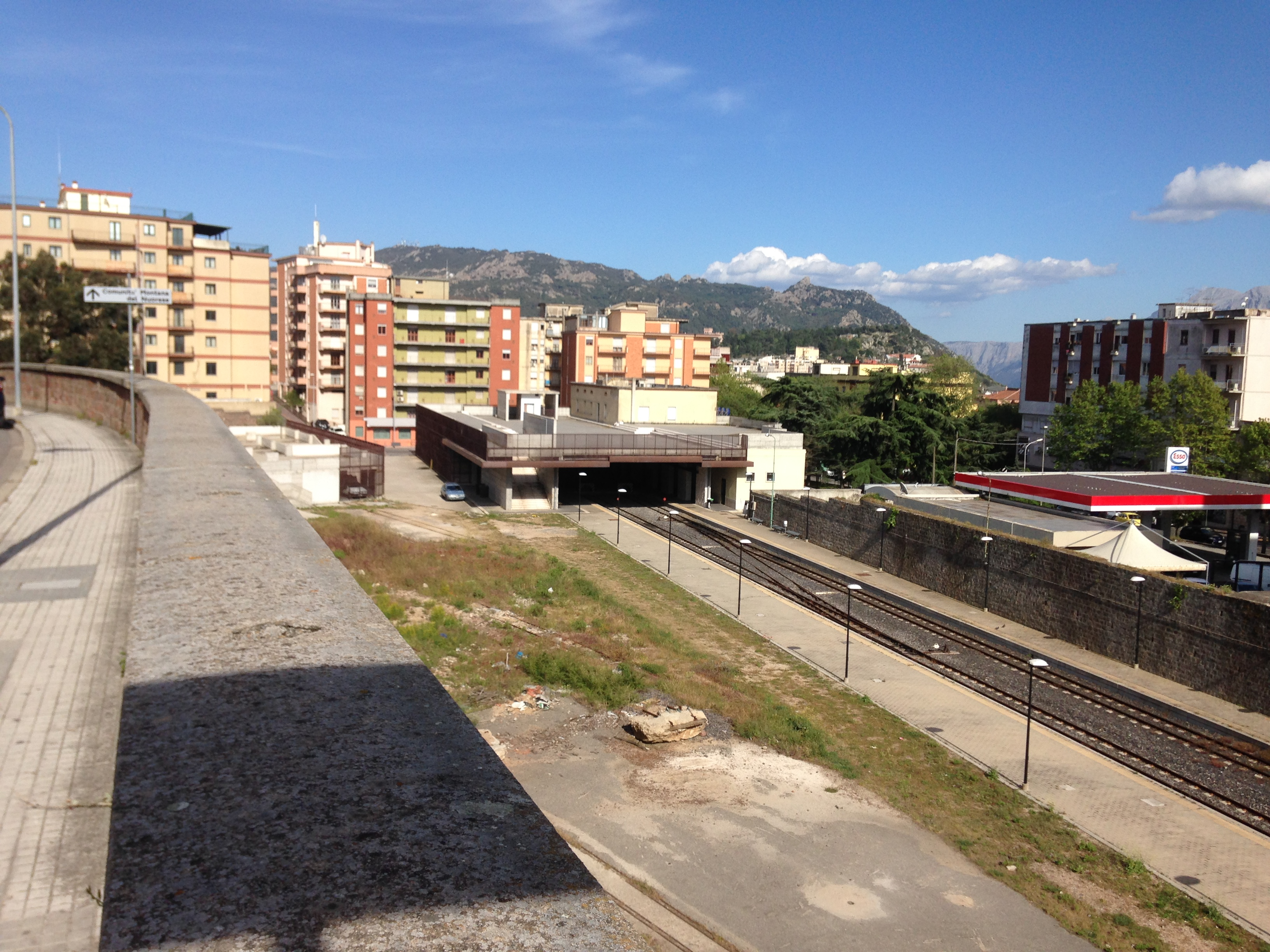 Stazione ferroviaria di Nuoro nel 2016 dopo i lavori di ristrutturazione (Vista da via Trieste)